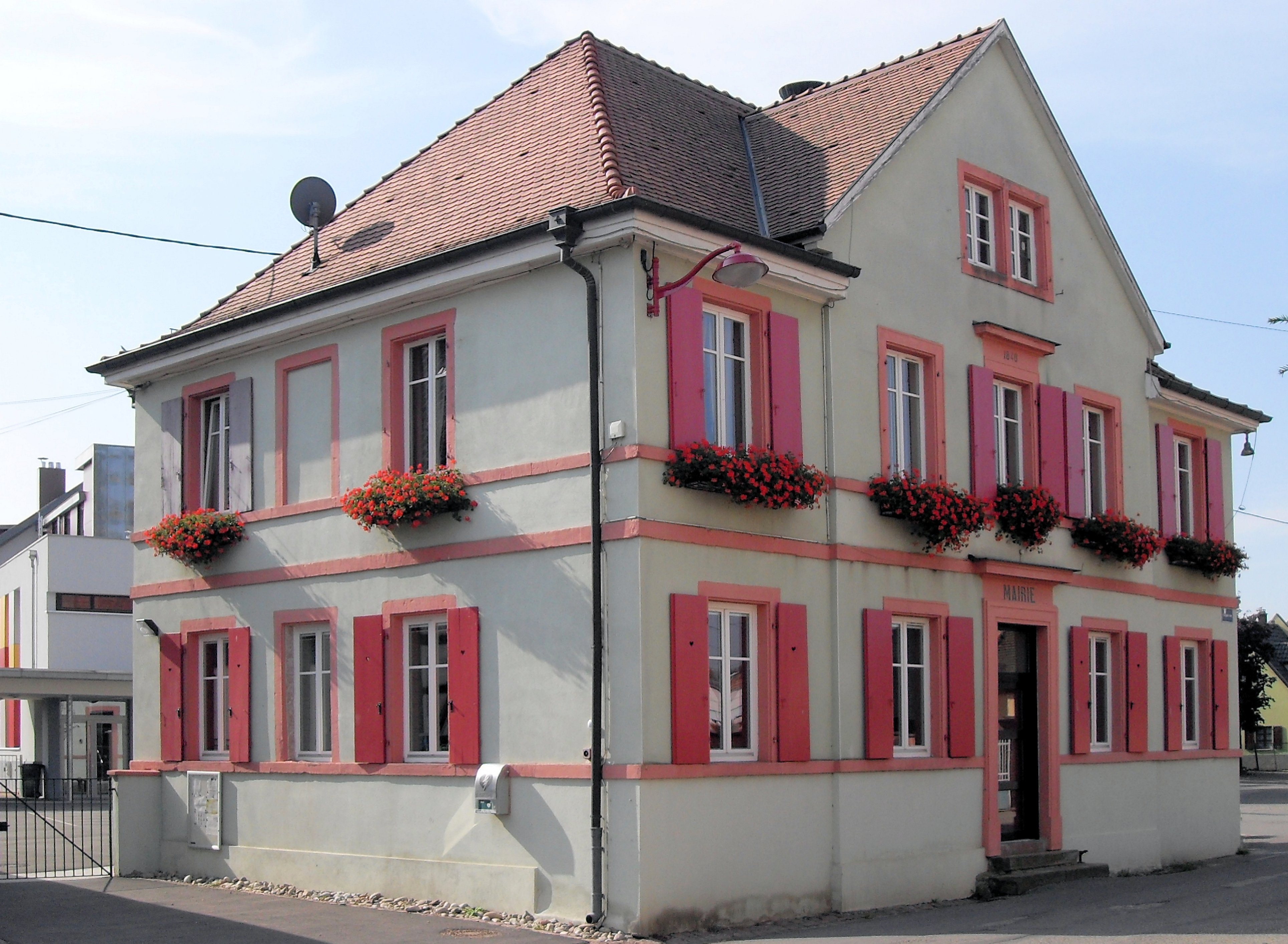 La mairie de Logelheim